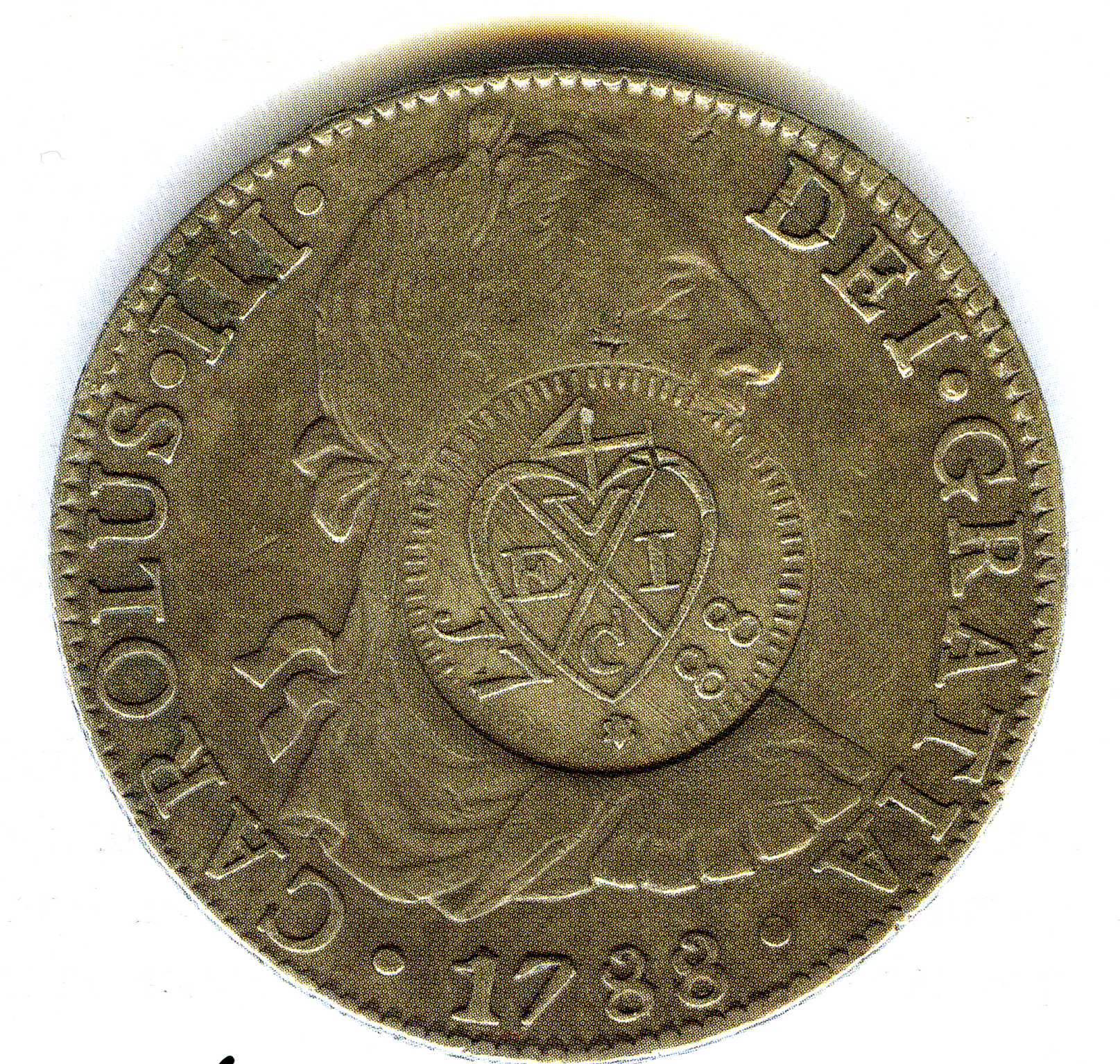 Moneda española utilizada en las colonias de la Compañía Británica de la Indias Orientales.